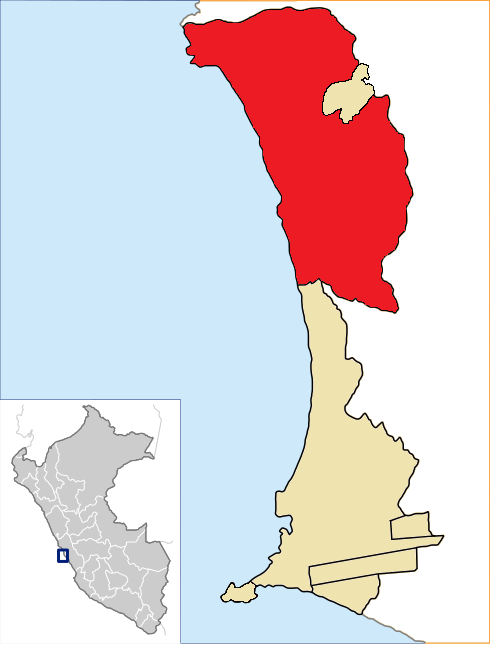 Ventanilla.